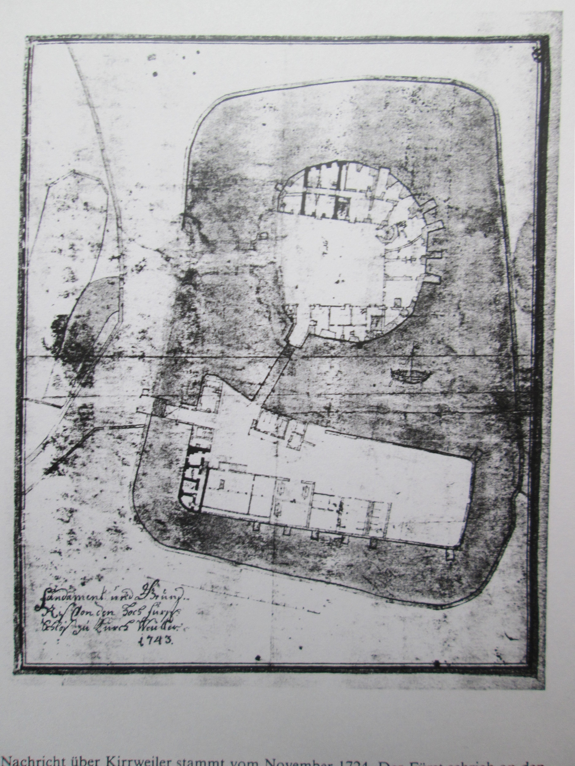 „Fundament und Grundriß von den hoch fürstl. Schloss zu Kürch Weüler“ Grundriss von Schloss Kirrweiler mit Schlossinsel und Wirtschaftsinsel (Vorburg)